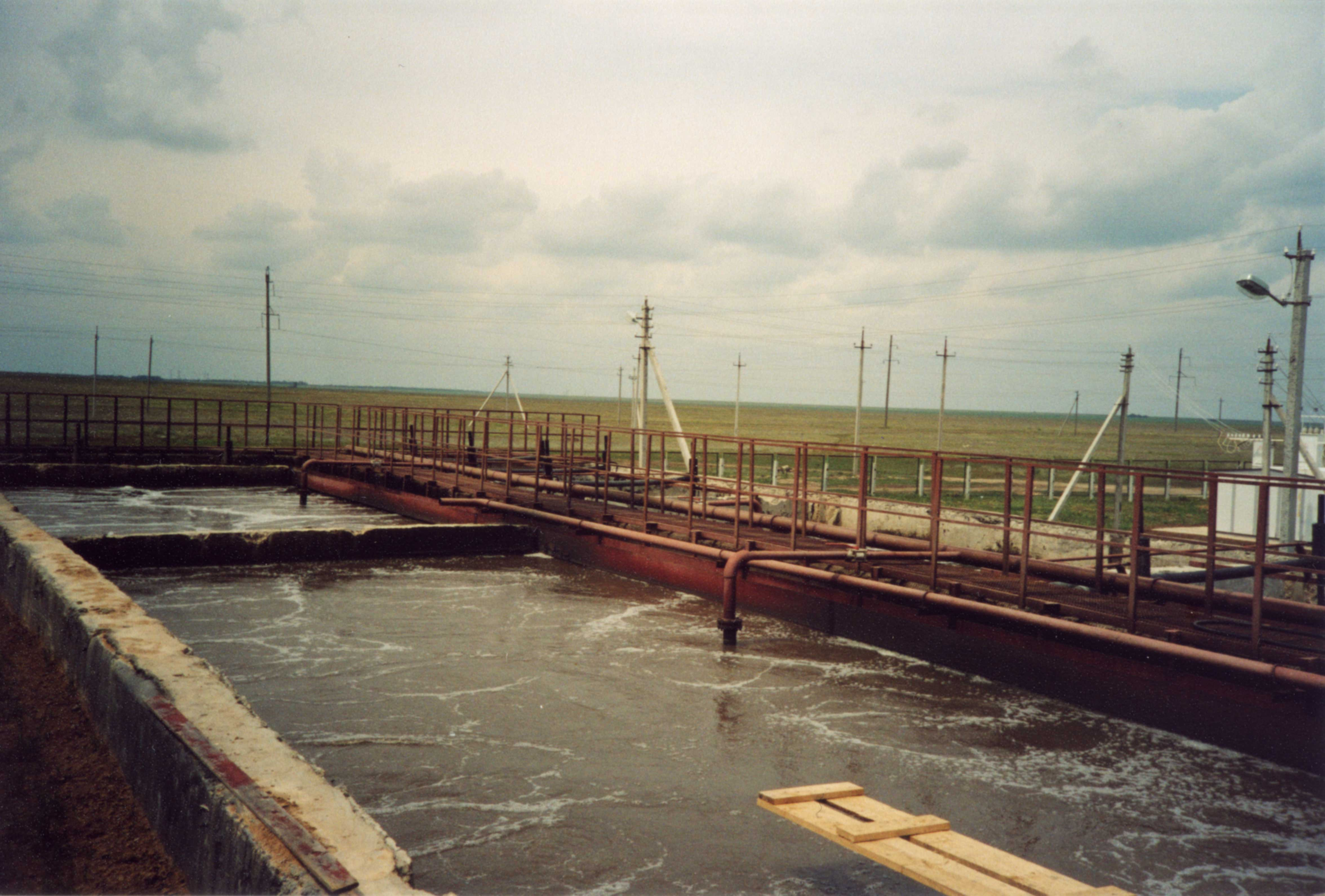 Саратовская область п.г.т. Горный. Объект уничтожения химического оружия (на данный момент не действующий). Аэротенк с активным илом.